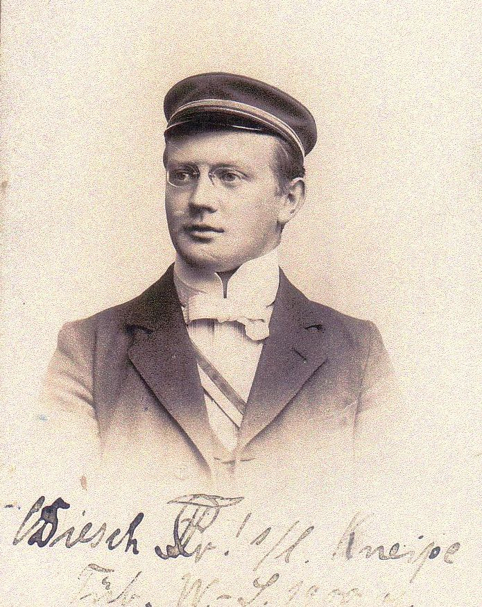 Portrait of Carl Diesch as student in Tübingen